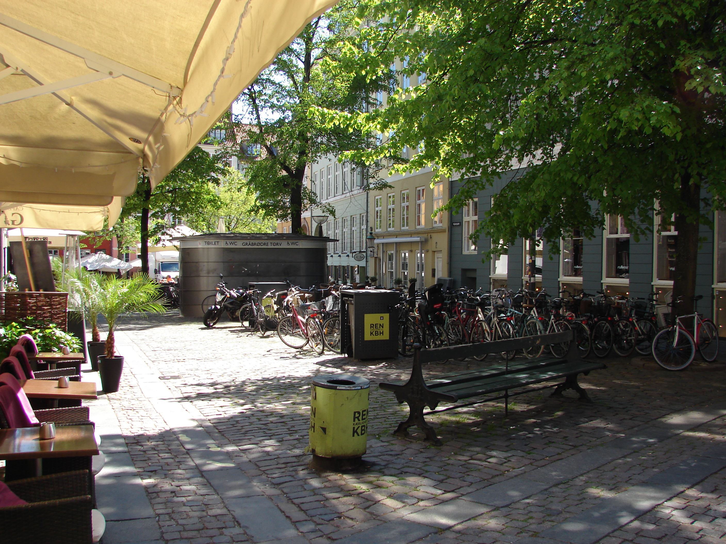 Kejsergade i København